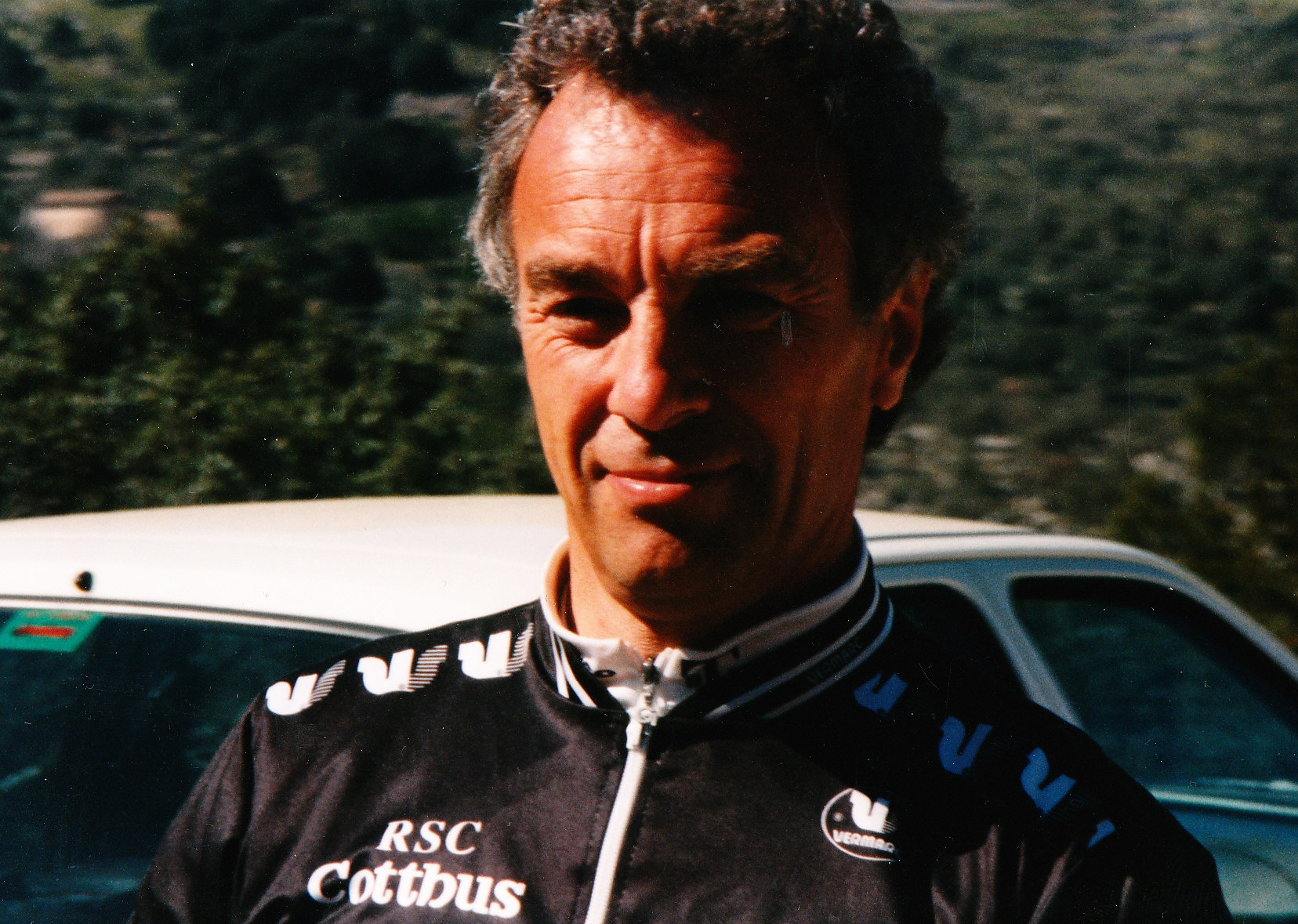 Radtrainer Robert Lange Porträt 1997 Mallorca